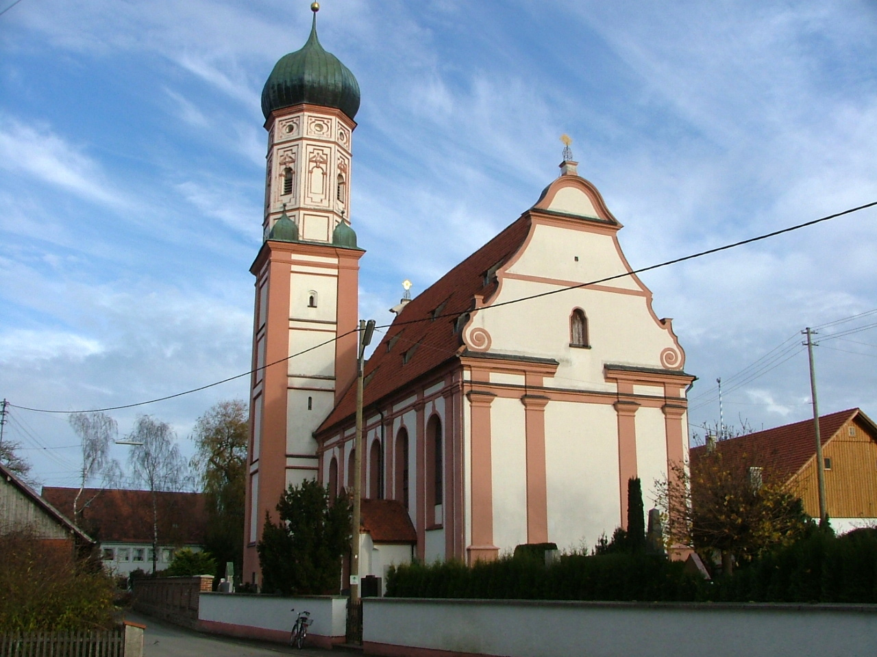 Oberostendorf